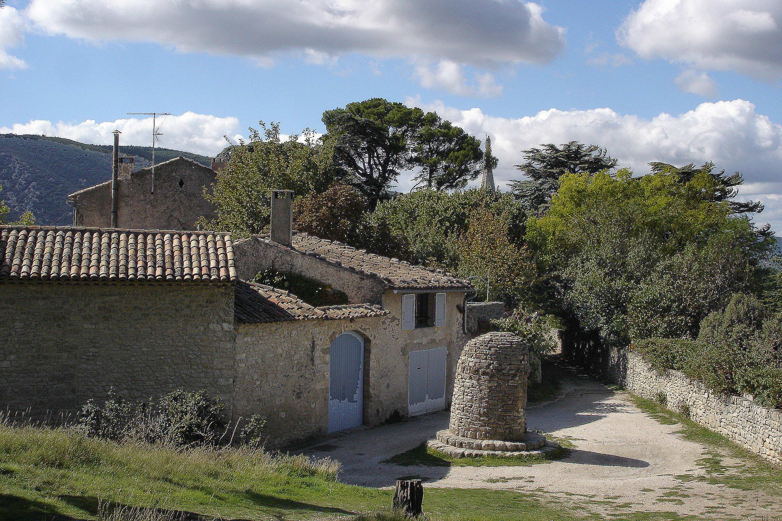 Maison et puits à Bonnieux